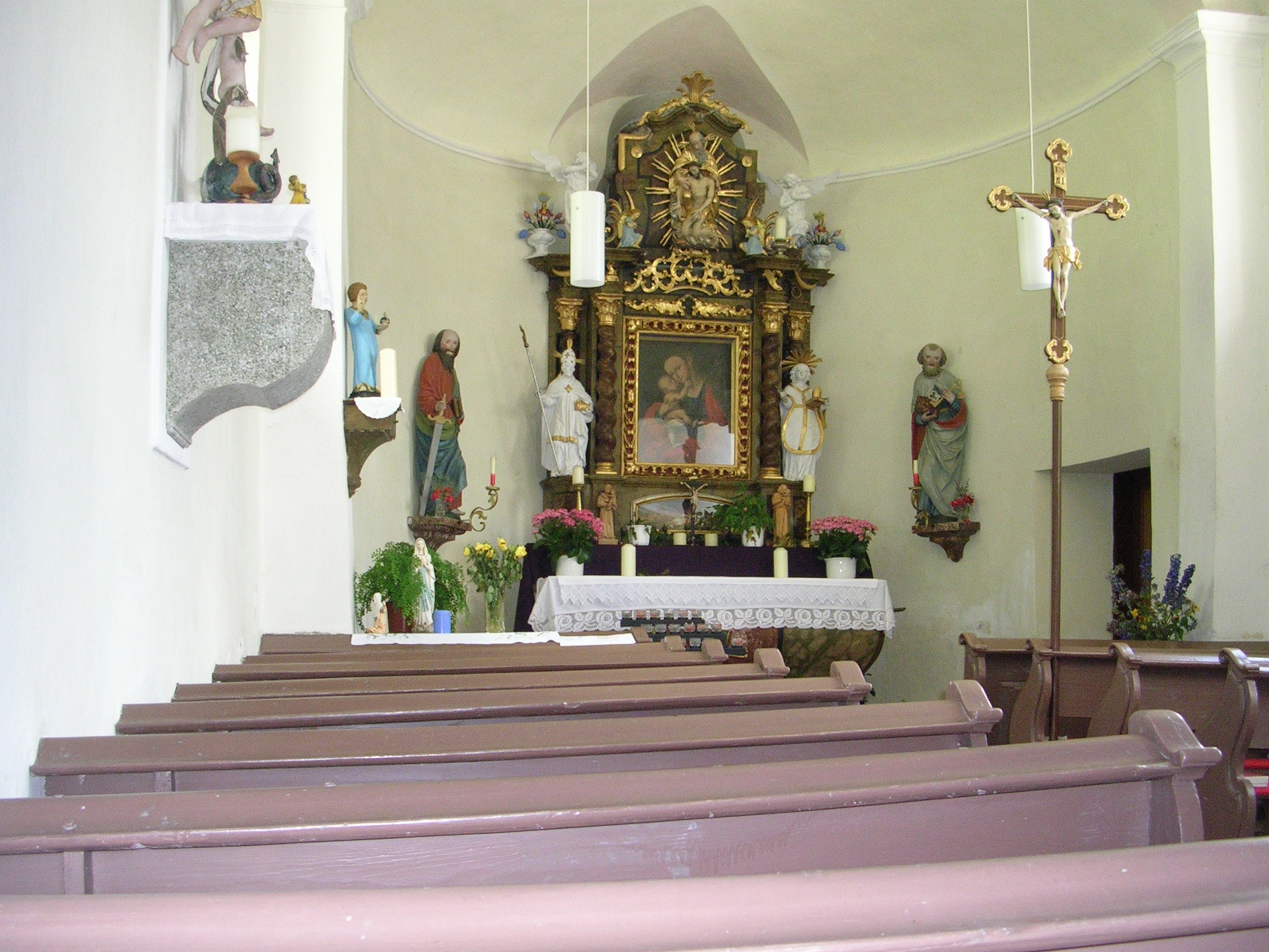 Die Kapelle Mellitz von Innen in der Gemeinde Virgen (Osttirol)